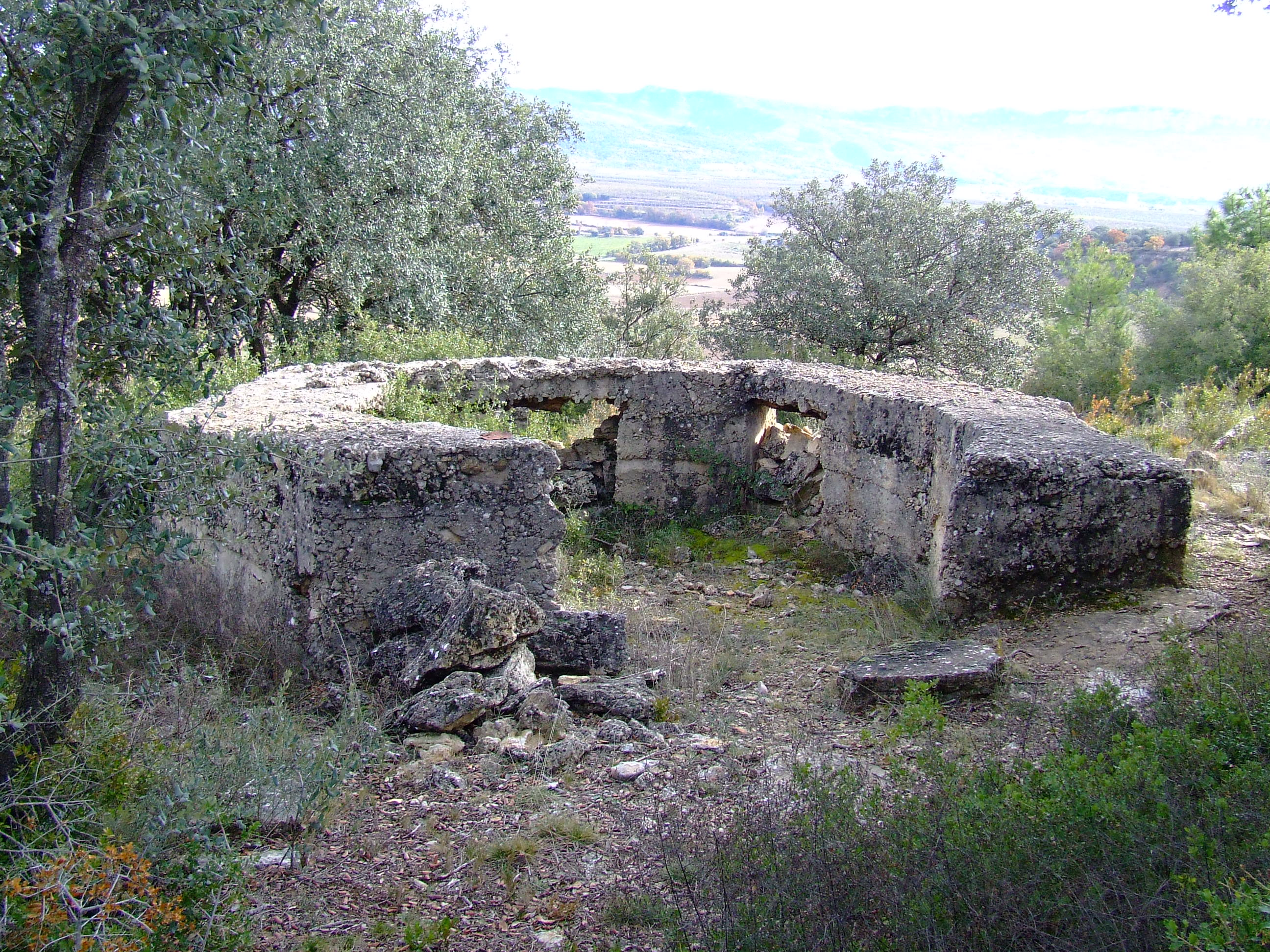 Un dels búnquers del Mont de Conques (Conques, Isona i Conca Dellà, Pallars Jussà)